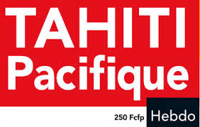 Logo du périodique Tahiti-Pacifique